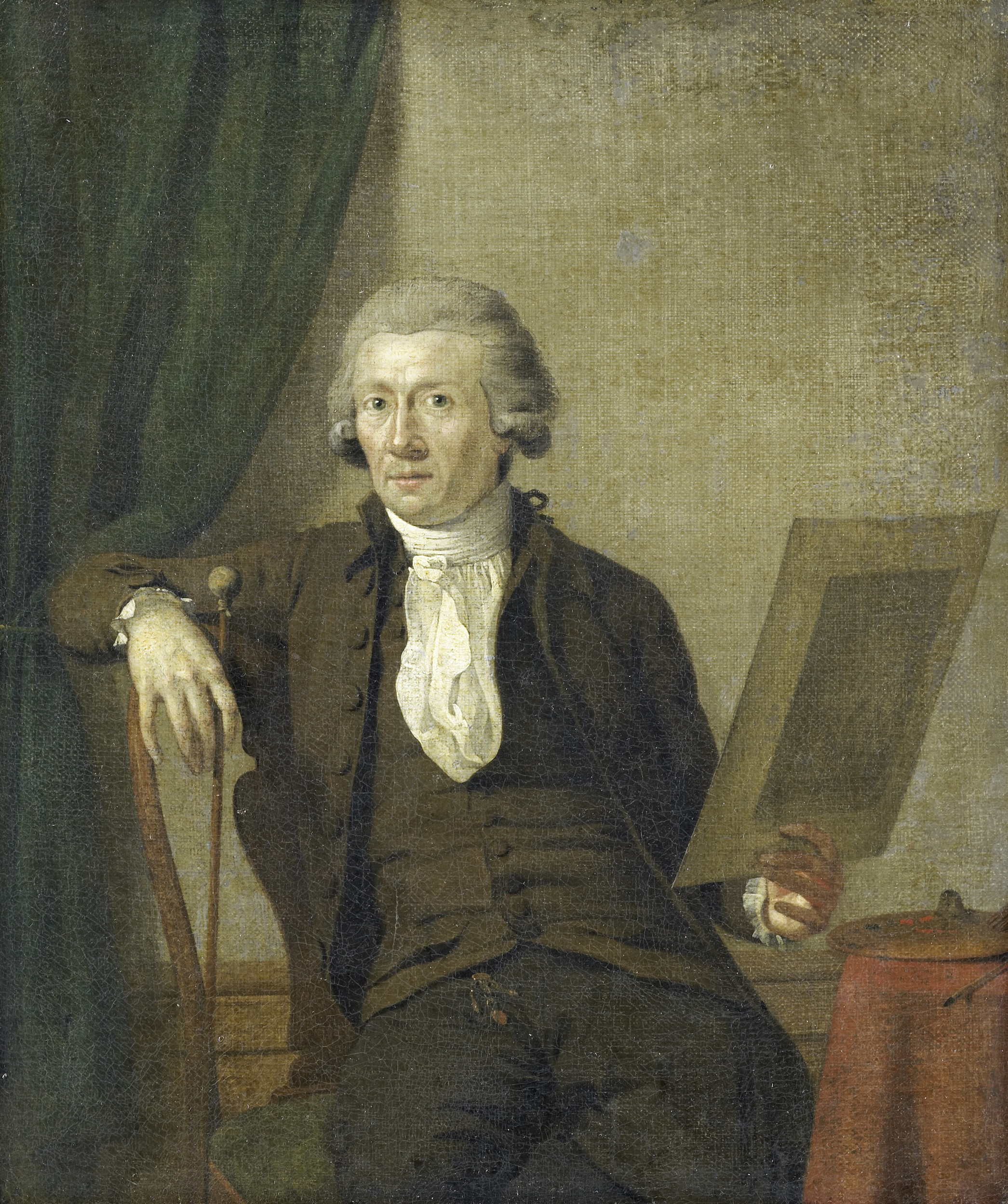 Portret van de schilder Egbert van Drielst. Kniestuk van de kunstenaar zittend in een stoel met een tekening of prent in de linkerhand, de schilderstok in de rechterhand. Een palet en penselen op een tafeltje rechts.